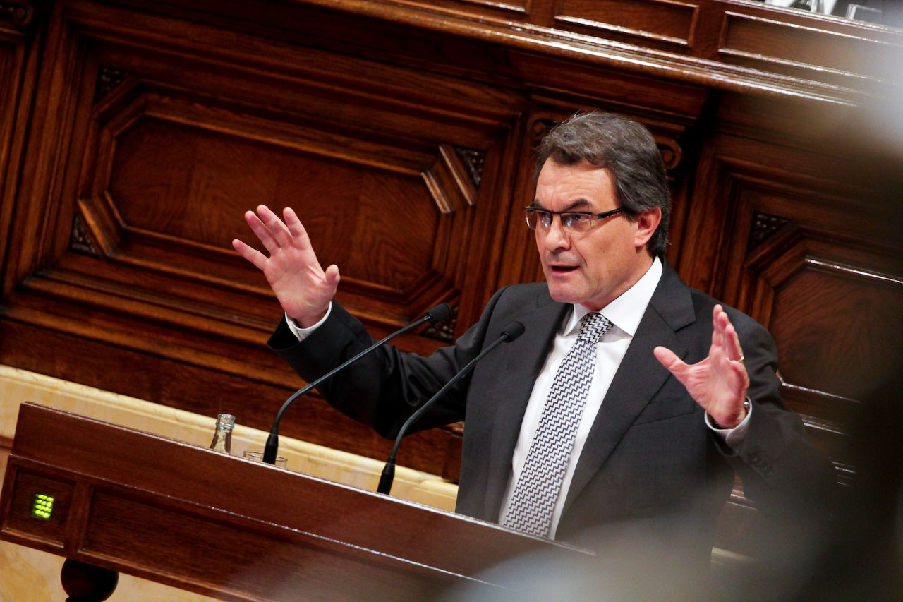 Foto: Parlament de Catalunya. Job Vermeulen.